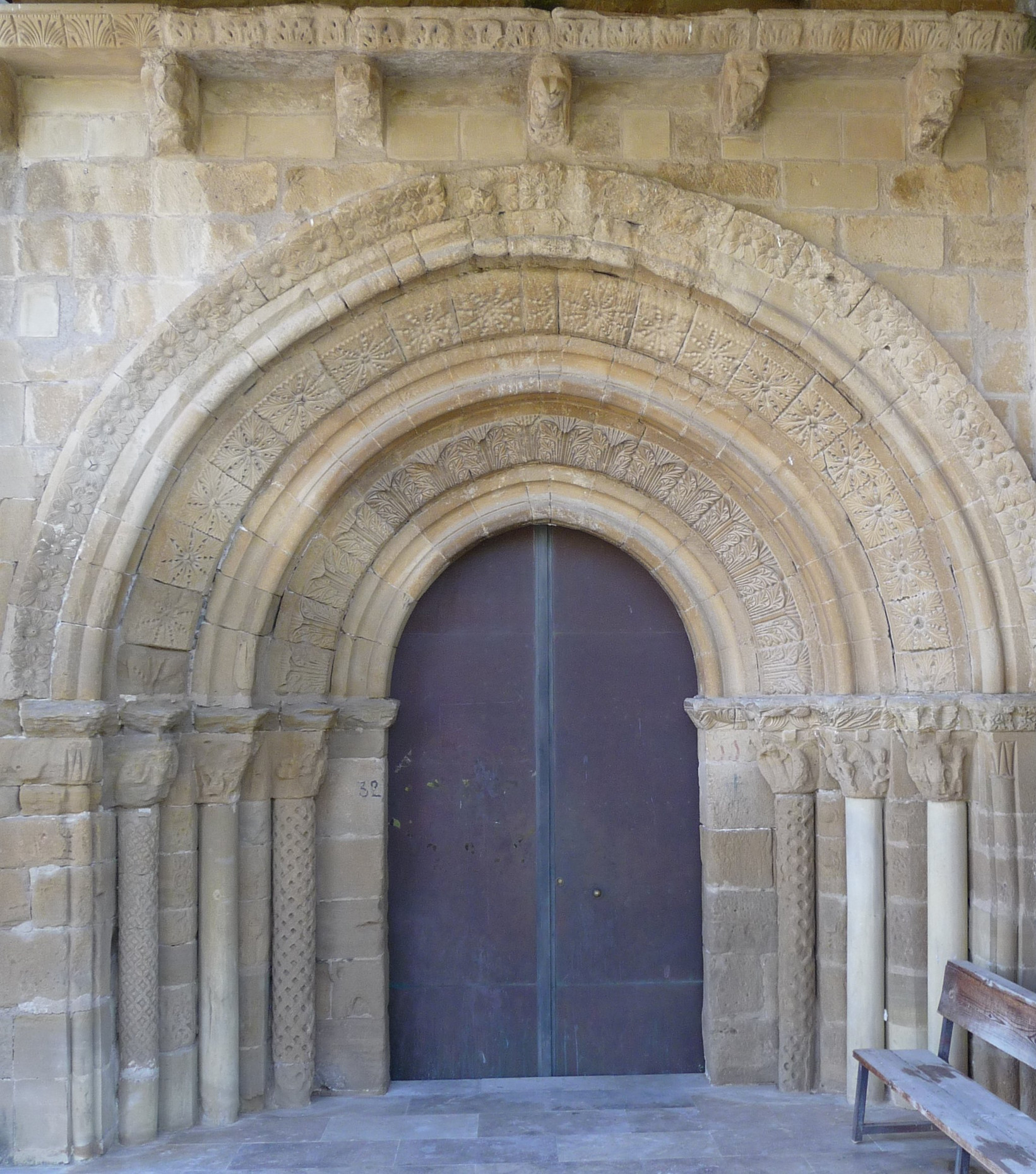 Portada Iglesia de la Concepción de Ochánduri. La Rioja (España)